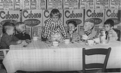 En cumpleaños de su hermana Nussi. Luis a la izquierda en la cabecera. Obviamente, entre cajas de bebidas.